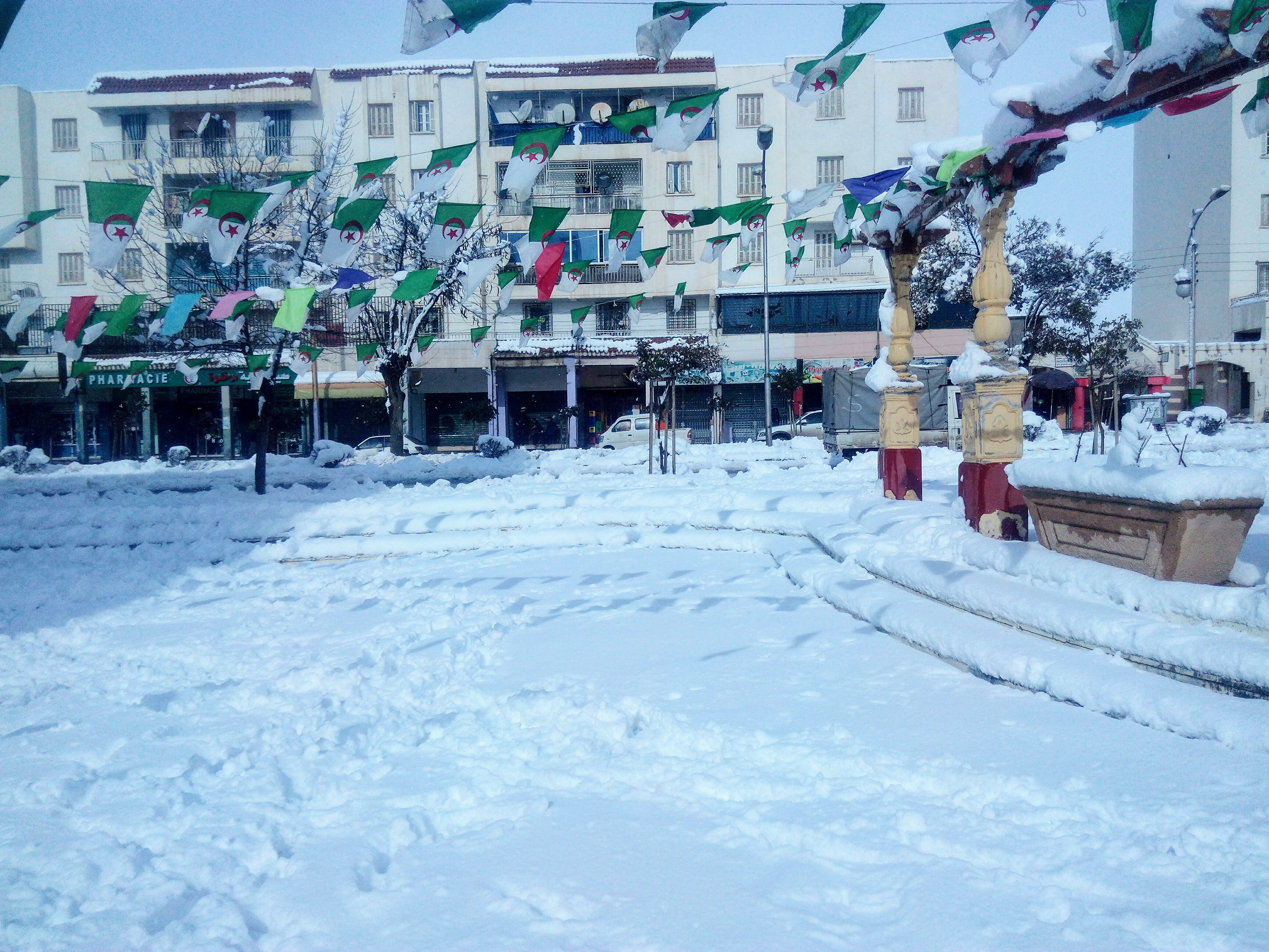 صورة من ساحة مقر البلدية